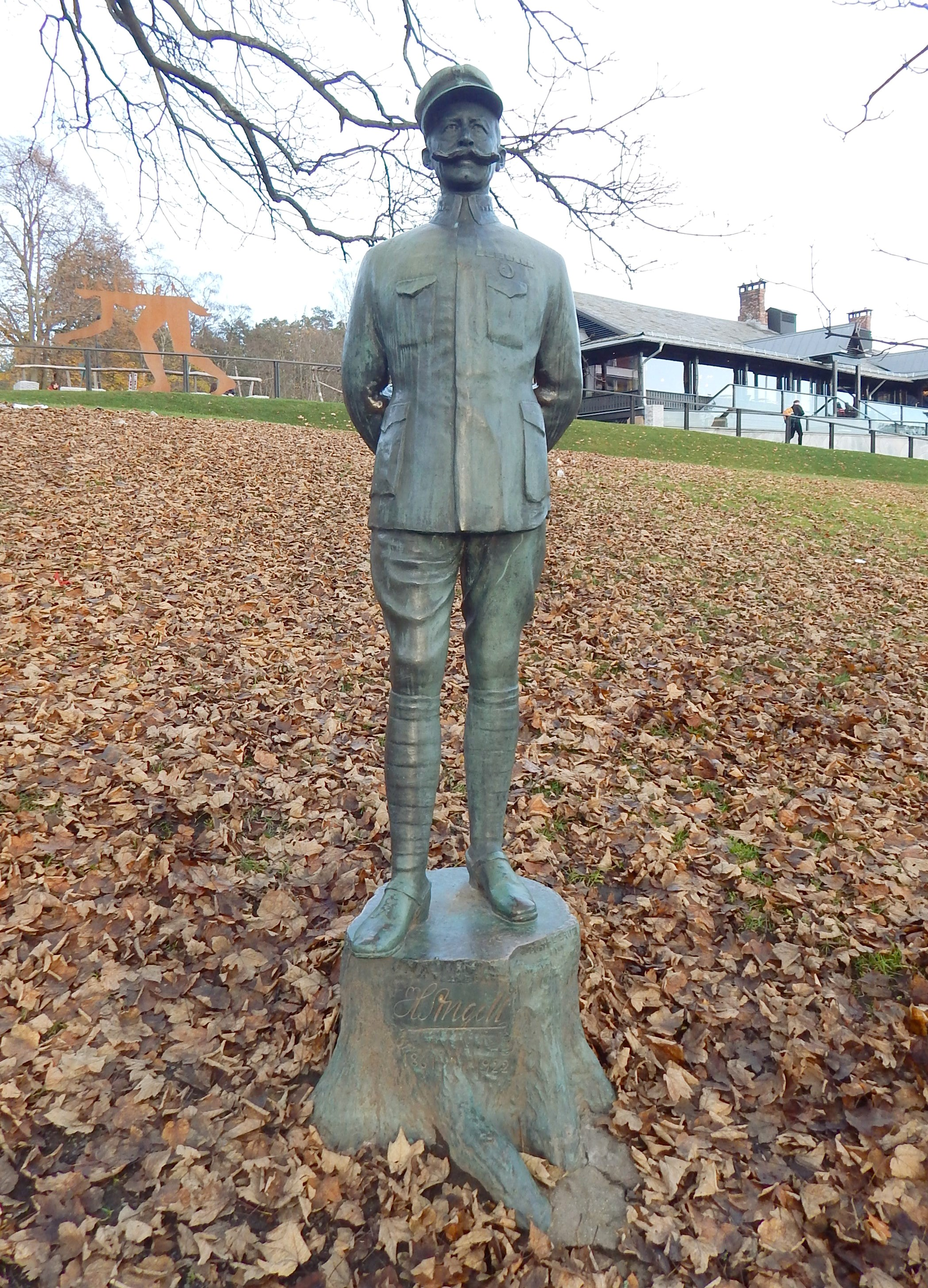 Monument over oberst Henrik August Angell nedenfor Holmenkollen restaurant. Utført av Gustav Lærum, 1923.